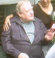 José Castillo Farreras, en la ceremonia donde fuera nombrada la biblioteca que lleva su nombre.